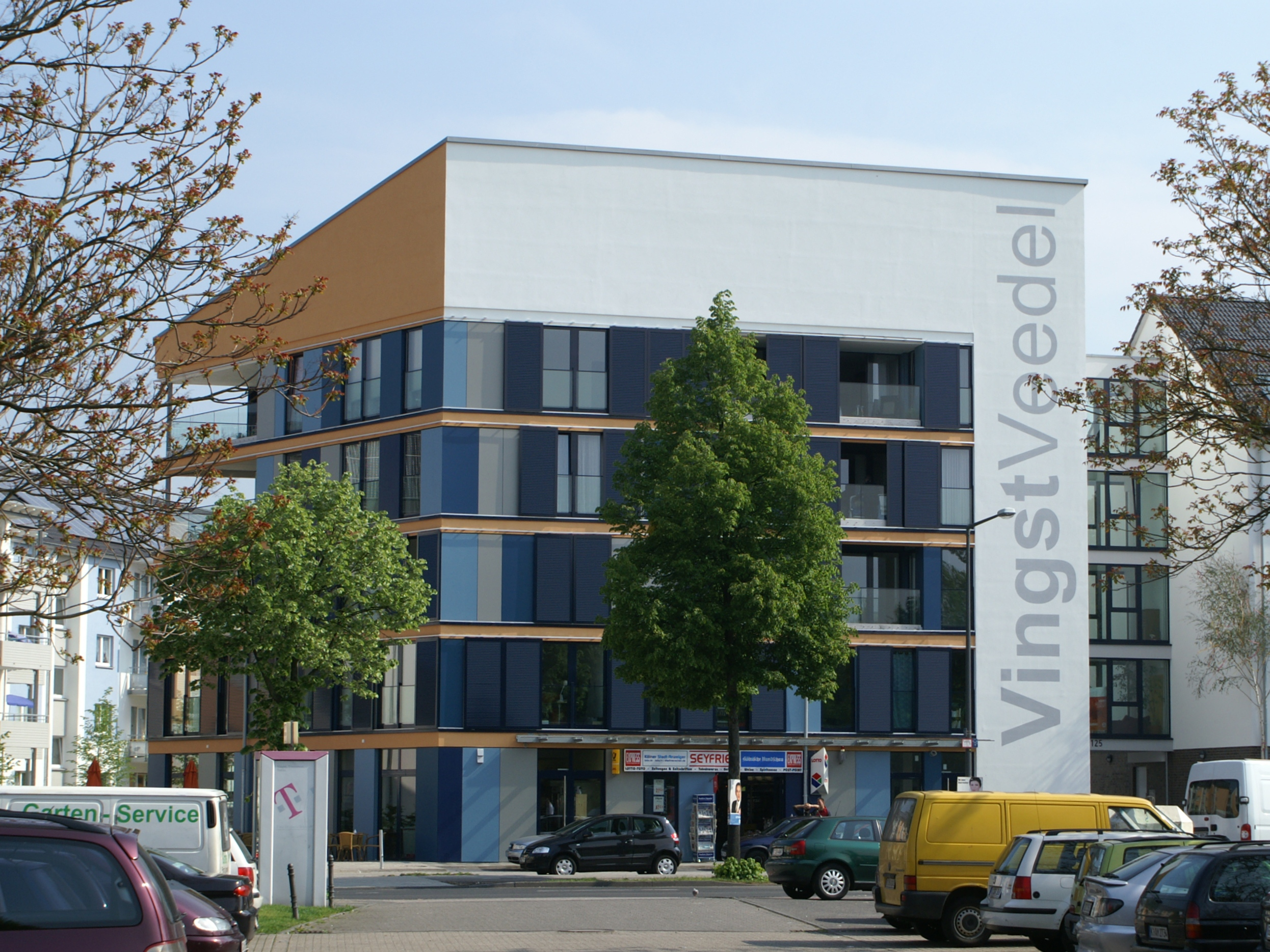 Der neue zentrale Mittelpunkt des Sanierungsgebietes Köln-Vingst wurde am 8. Mai 2010 mit einem Bürgerfest eröffnet.